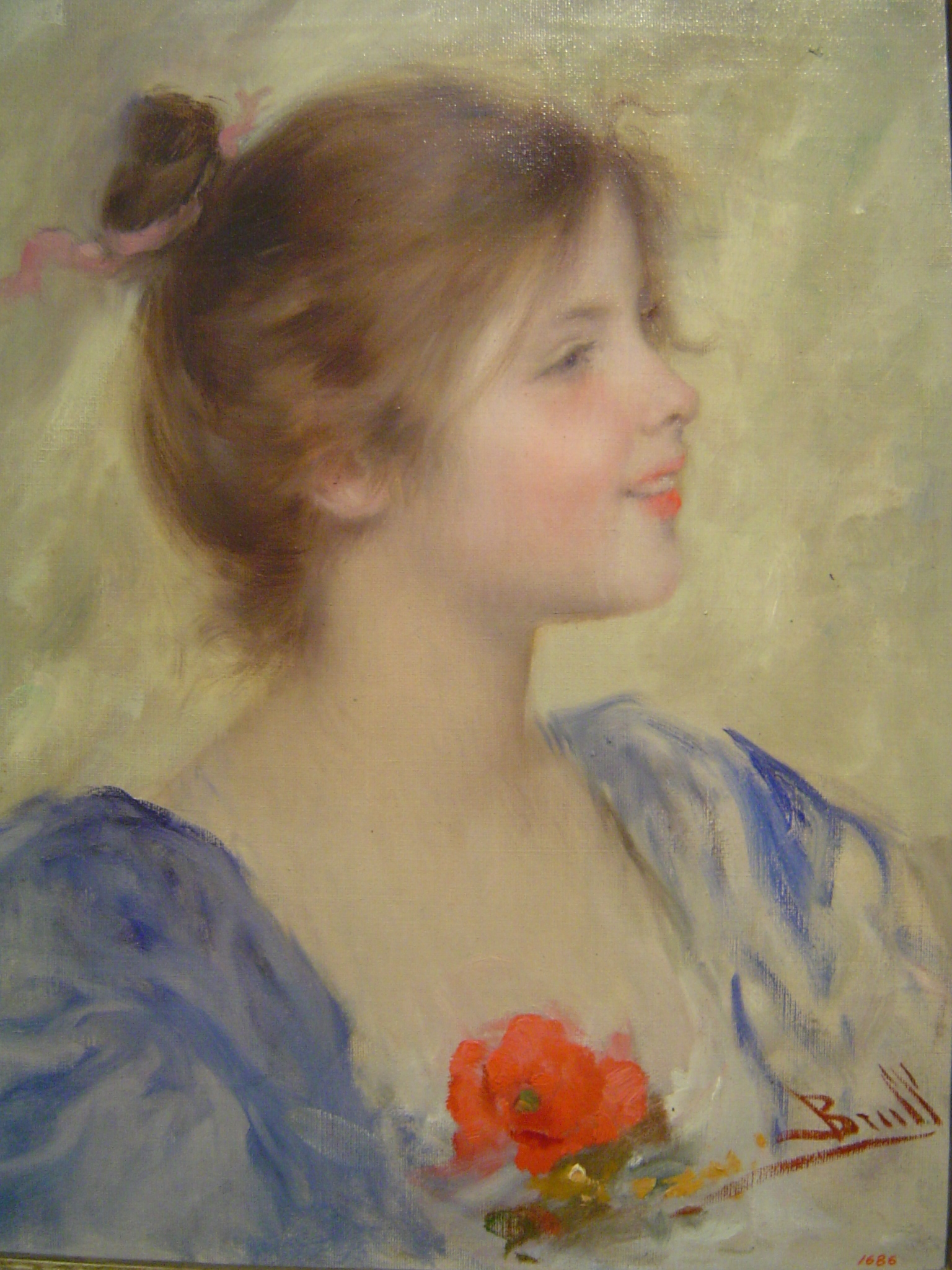 Retrat del perfil d'una noia jove amb monyo i una cinta rosa. Porta un vestit blau amb unes flors vermelles a l'escot